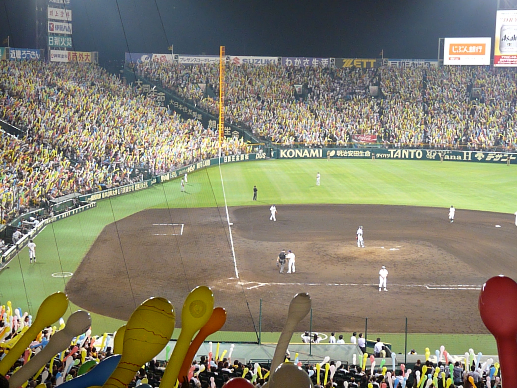 Koshien Stadium